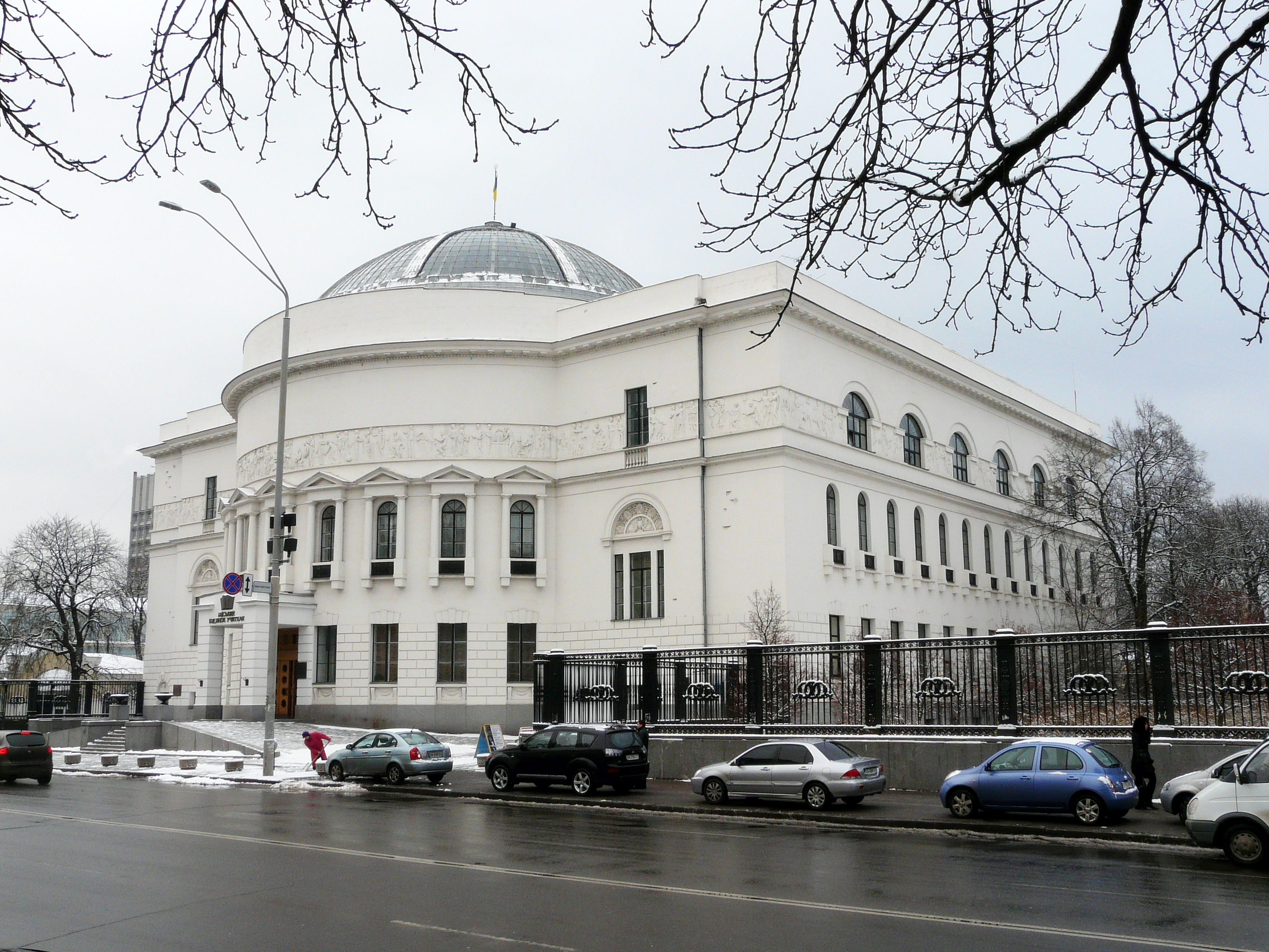 Будинок Педагогічного музею, в якому у 1913–1915 рр. містилося Київське товариство охорони пам'яток мистецтва і старовини, музей товариства; у 1916–1917 рр. — Київська школа льотчиків-спостерігачів; у 1918 р. відбувалися засідання Центральної Ради, Київ, Володимирська вул., 57